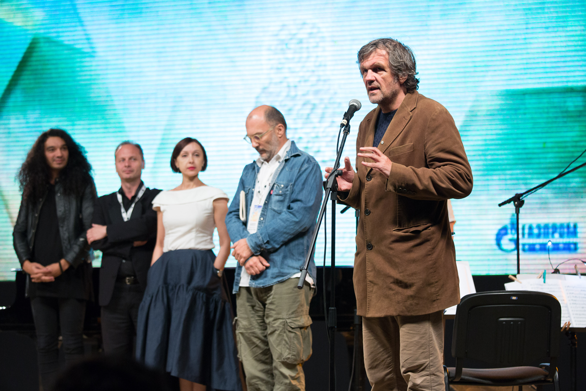 Эмир Кустурица, учредитель фестиваля русской музыки "Большой"